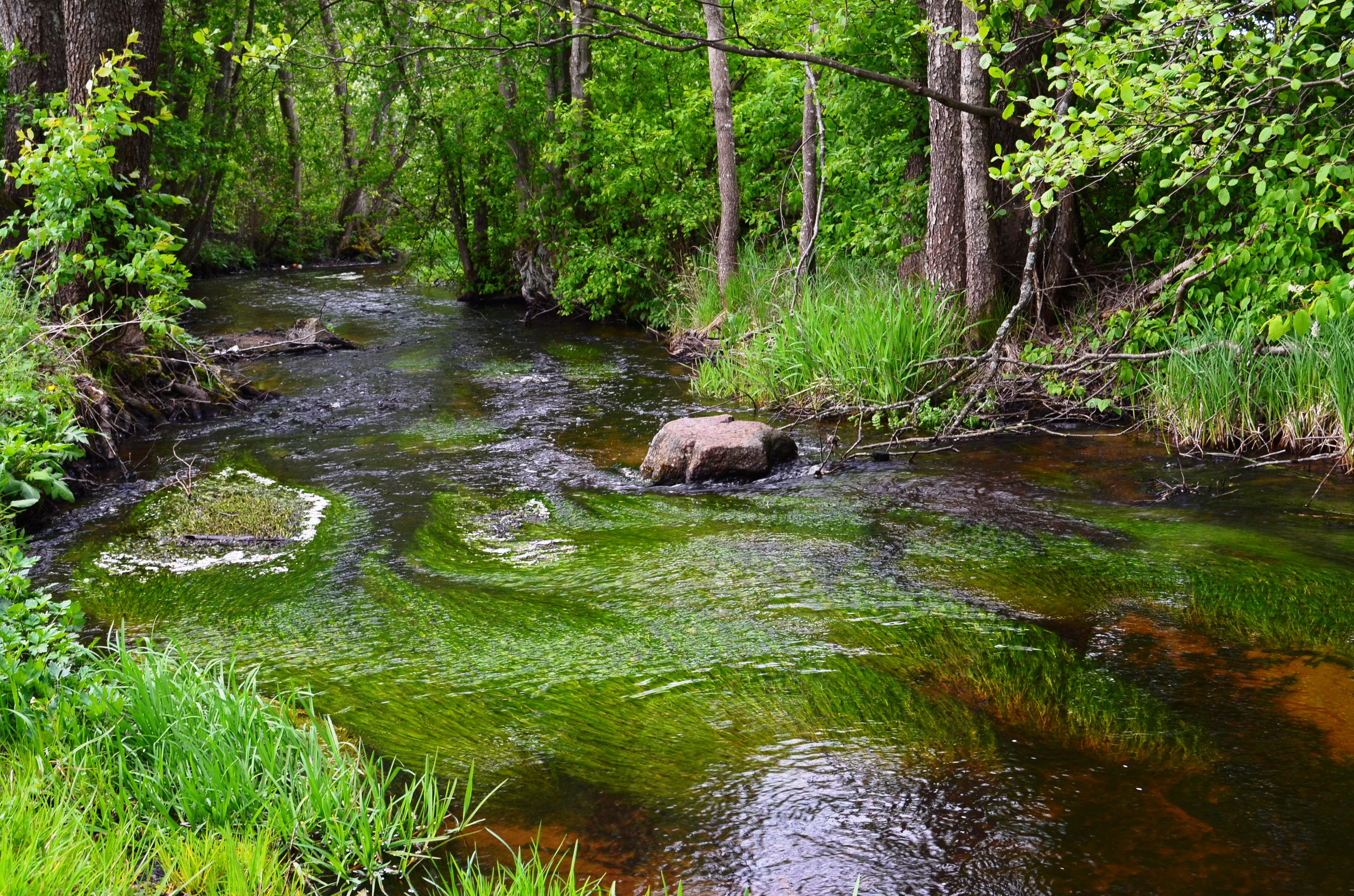 Veržuvos upelis ties Aukštąja Veržuva, Vilnius